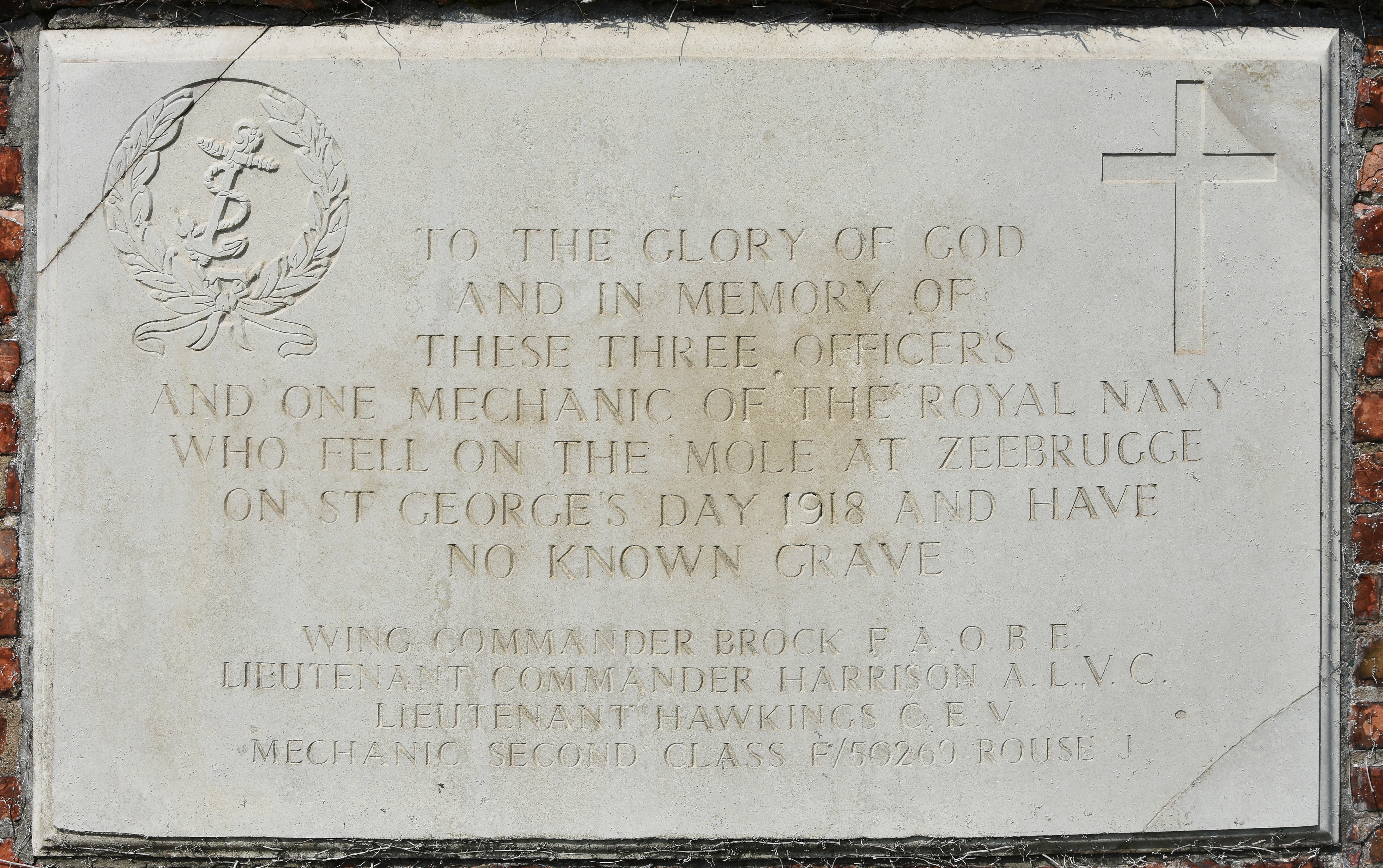 Gedenksteen voor de aanval op de haven van Zeebrugge van 23 april 1918